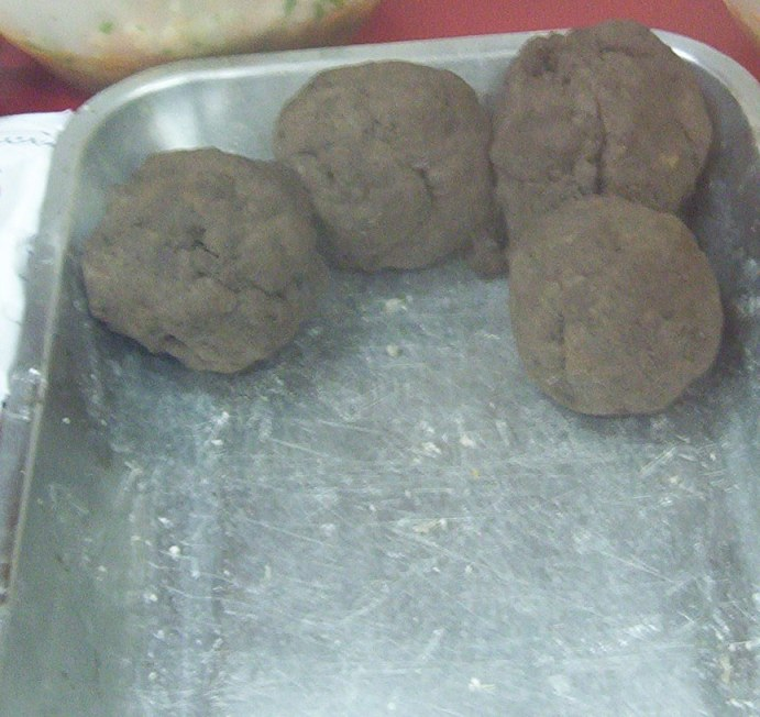 Papas ralladas y exprimidas (con cambio de color por oxidación) para preparar milcaos, una comida típica de Chiloé (Chile)